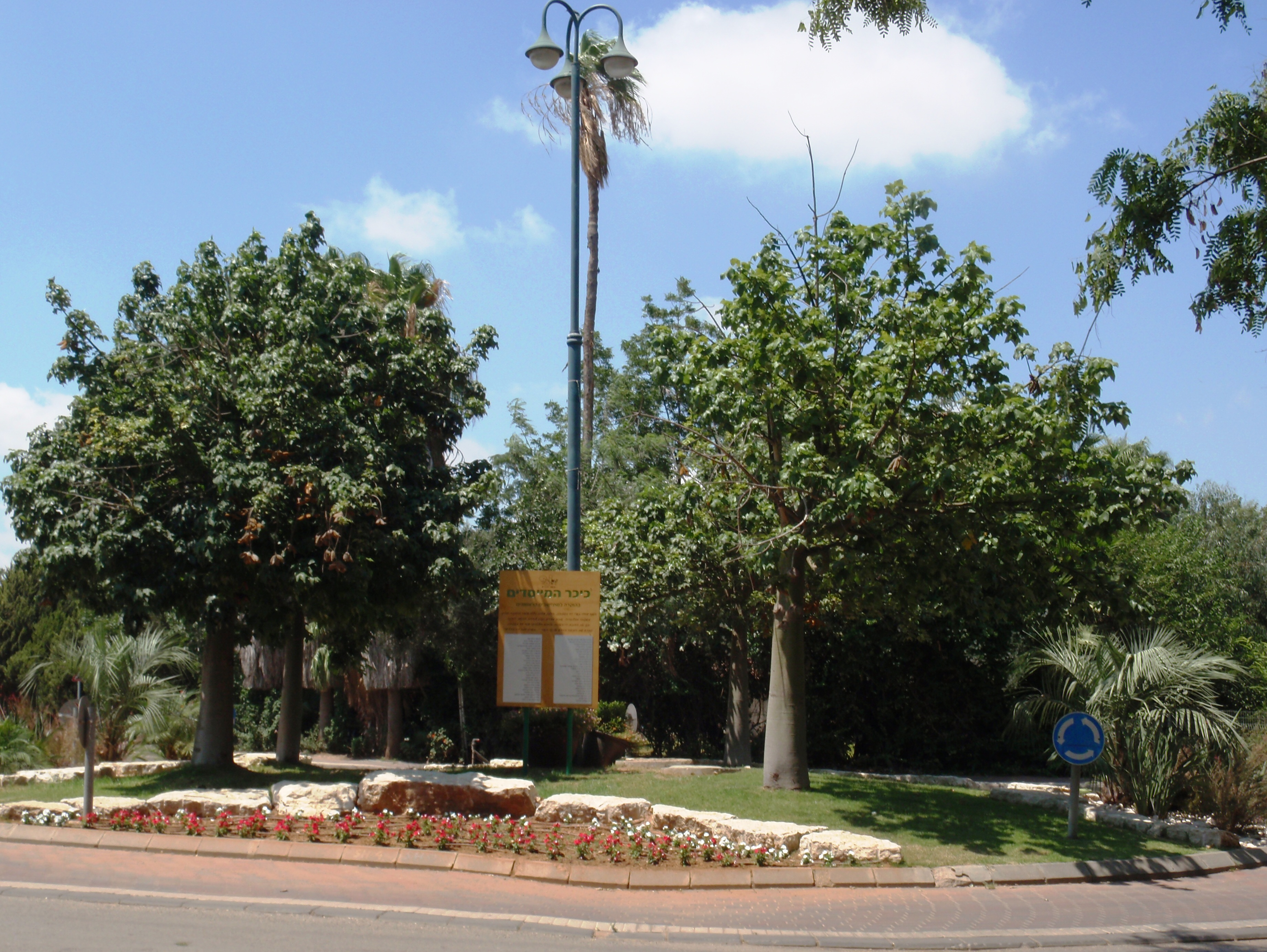 Moshavim עדנים כיכר המייסדים